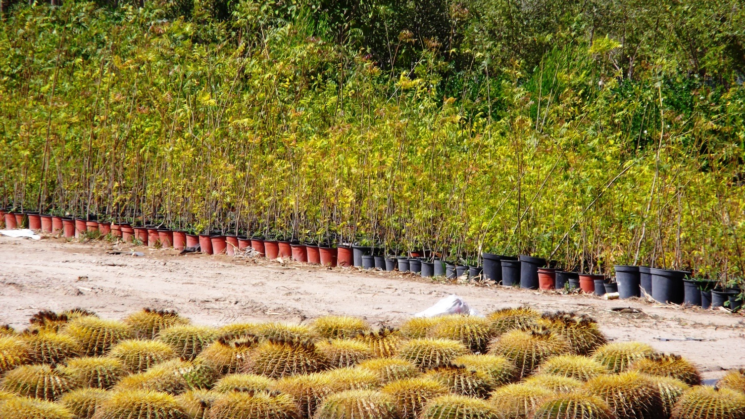 Abu Hamour Market, Doha